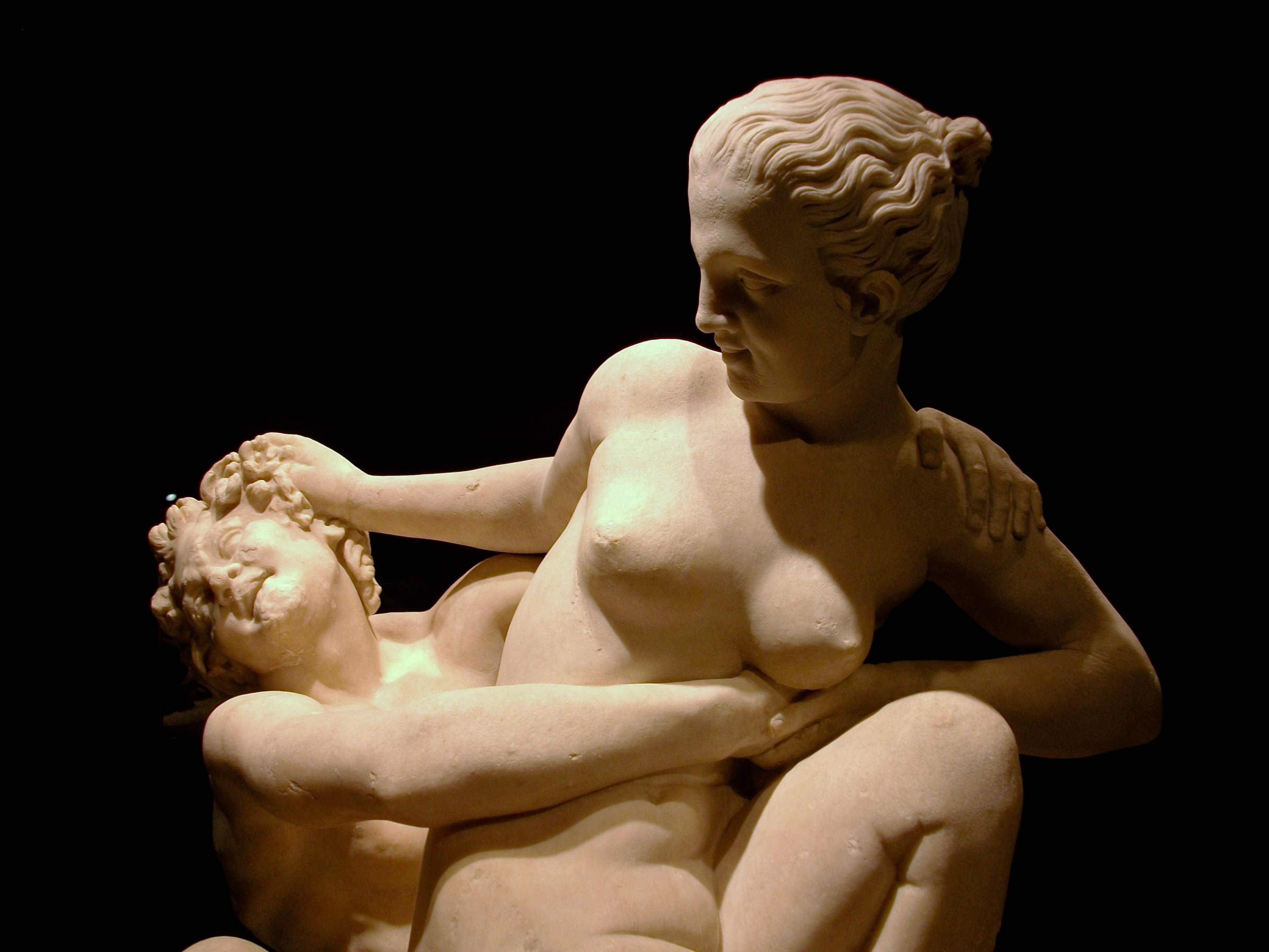 Sàtir i nimfa, intent de violació, exposició de la Bellesa del Cos, Museu Arqueològic d'Alacant. Aquesta jove que forceja per escapar d'un sàtir és una nimfa, ésser sobrenatural associat a la naturalesa. Els sàtirs eren éssers mítics de cos en part humà però amb potes, cua i orelles de cavall. Era habitual representar les nimfes, éssers singulars, nues i moltes vegades víctima d'agressió sexual de sàtirs. Aquesta classe d'imatges eren una modalitat de pornografia que omplia les fantasies masculines sobre relacions sexuals desenfrenades en una societat en què entre ciutadans i dones respectables estaven estrictament regulades. Aquesta és una de tantes còpies romanes d'una obra anterior grega dels segles II i I a. C. que no s'ha conservat.